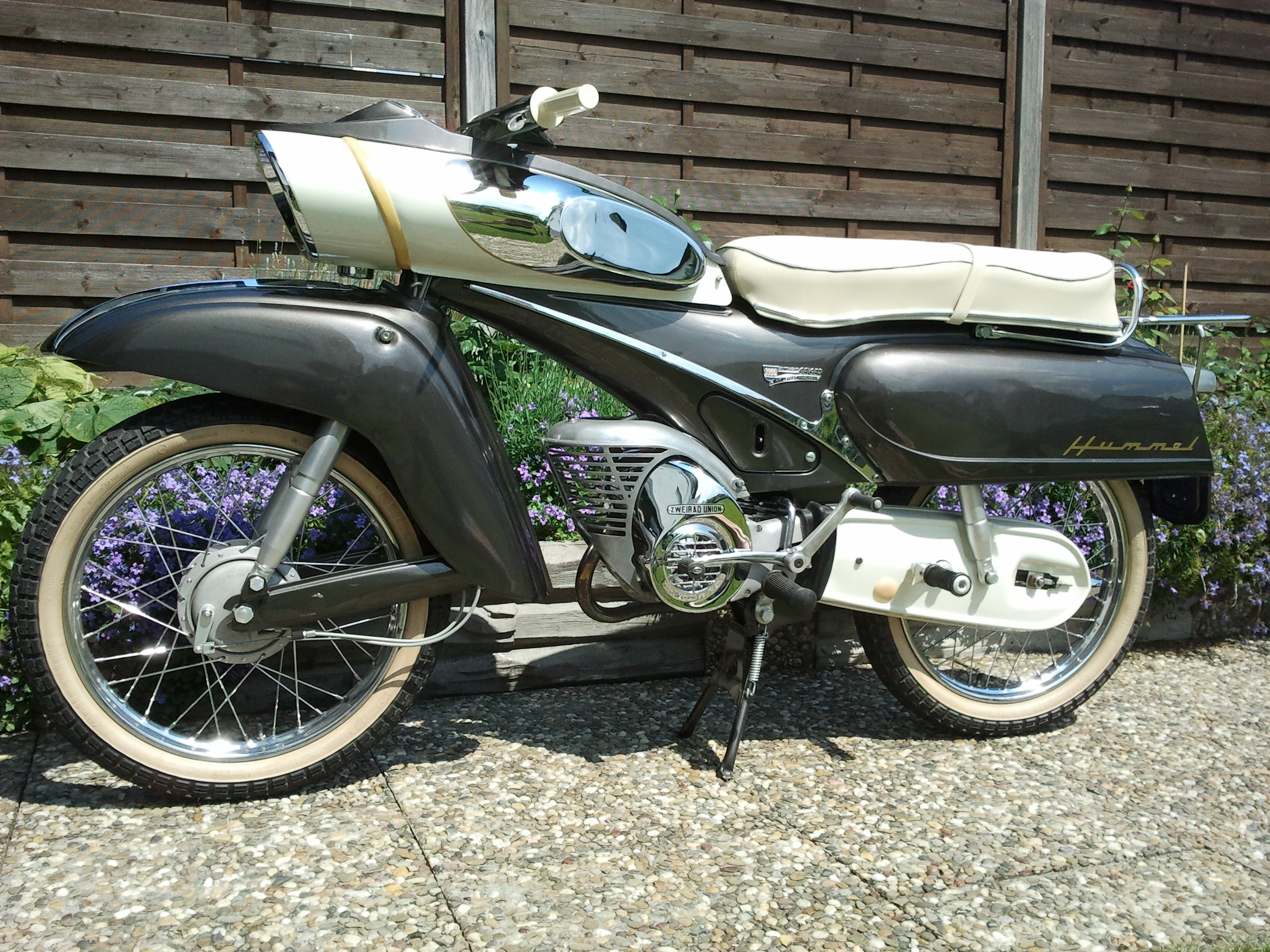 Dies ist eine DKW Hummel 115 der Zweirad Union aus dem Jahr 1961.